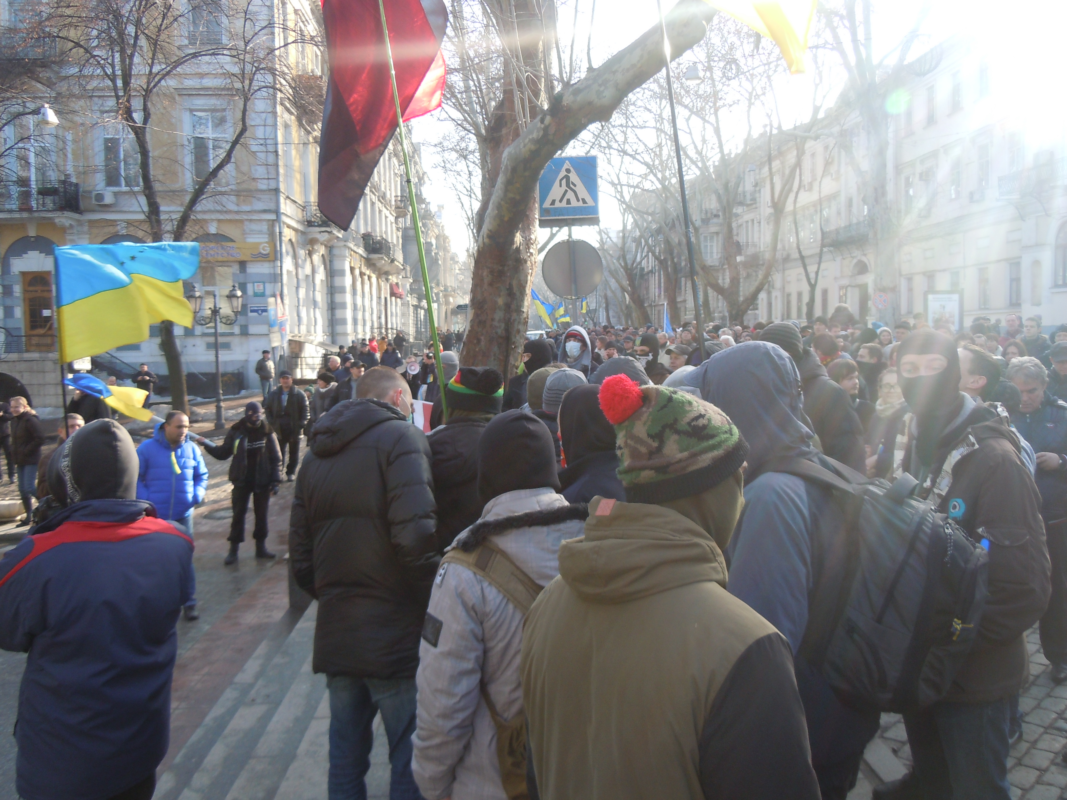 "Марш западенців", Одеса. Пікет під будівлею Обласної прокуратури Одеської області на вулиці Пушкінській.